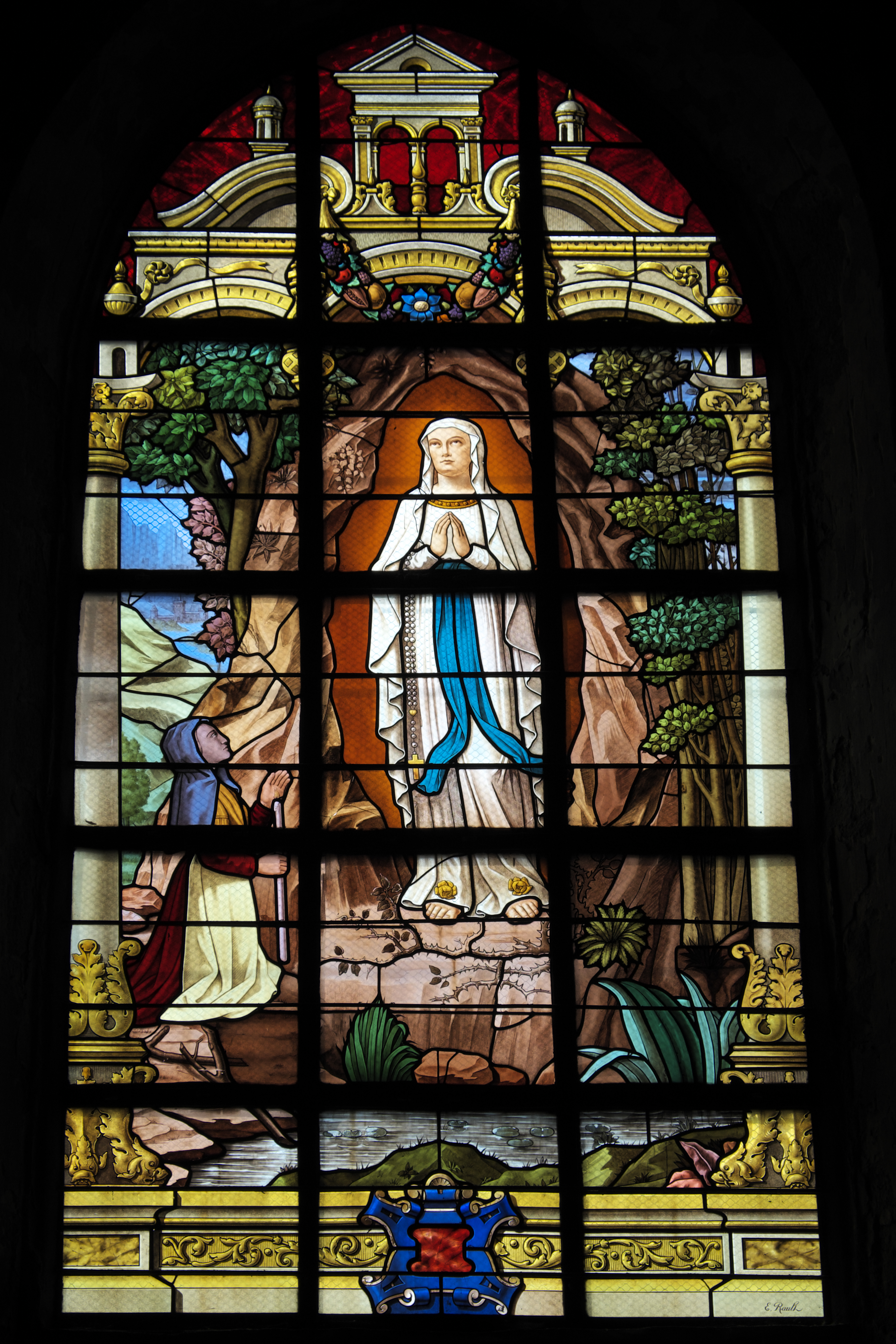 Kirche Saint-Crépin-et-Saint-Crépinien in Rannée im Département Ille-et-Vilaine (Bretagne/Frankreich), Bleiglasfenster mit der Signatur: E. Rault, Darstellung: Marienerscheinung in Lourdes .